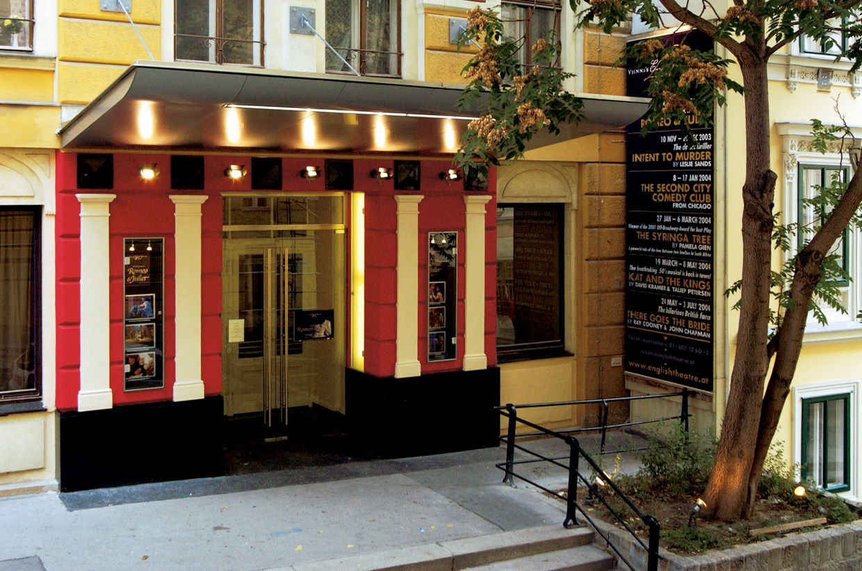 Eingansportal Vienna's English Theatre